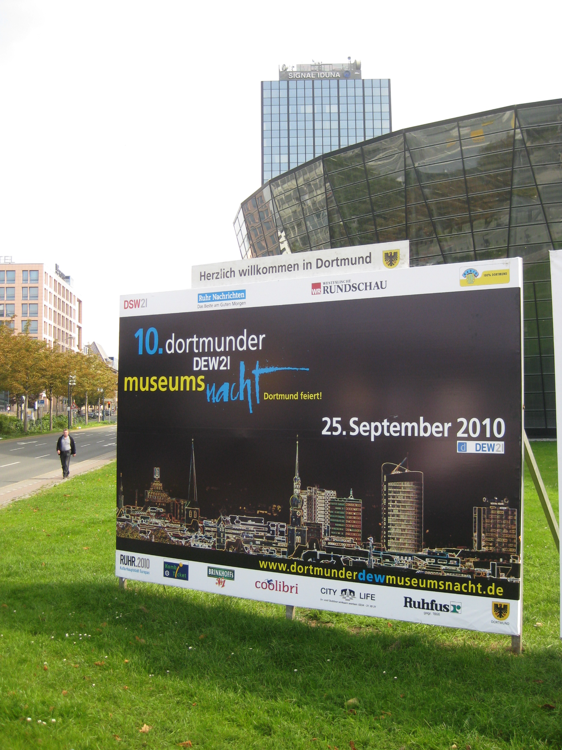 Plakat der 10. Dortmunder DEW21-Museumsnacht vor der Stadt- und Landesbibliothek